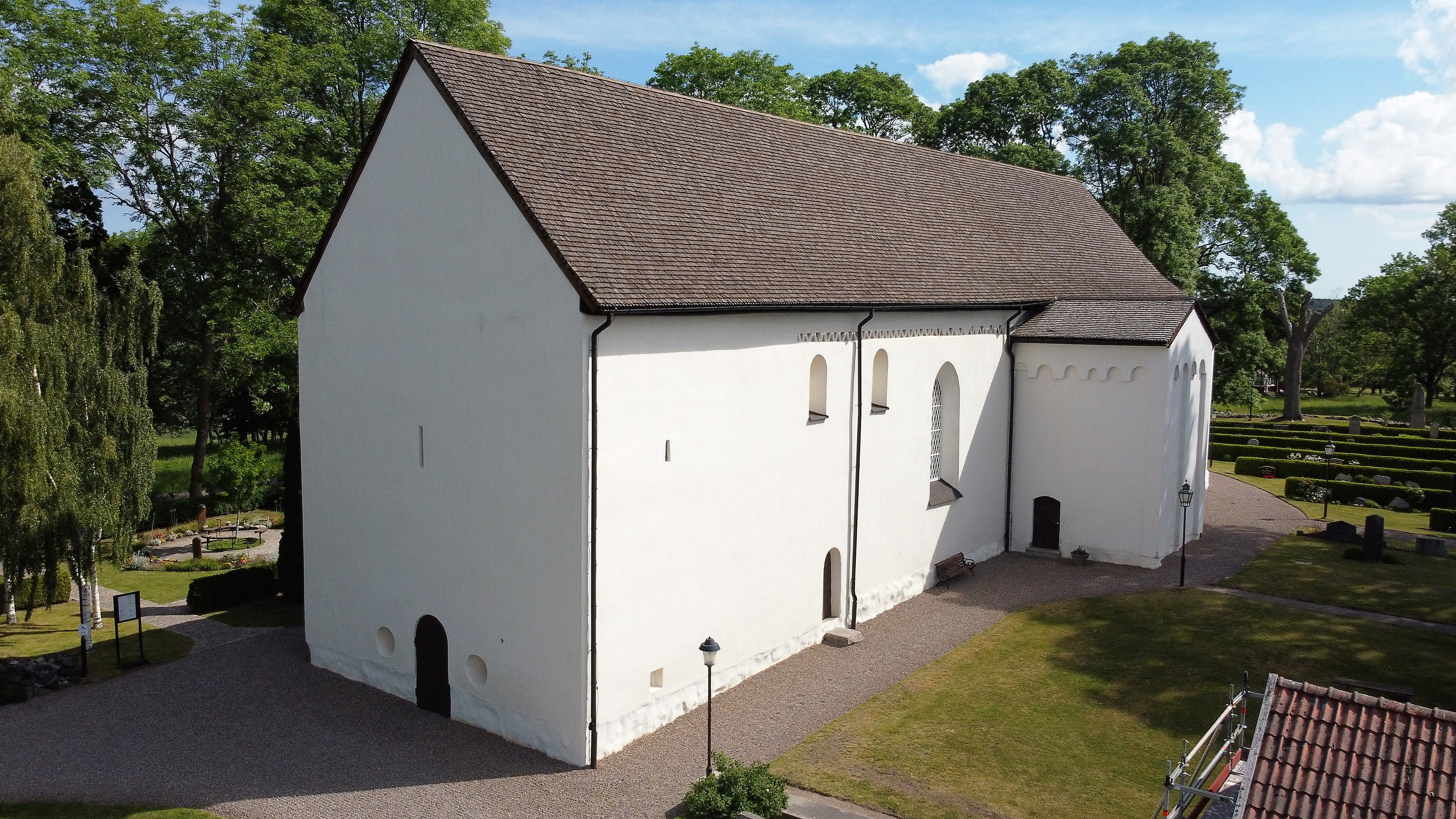 Drönarfoto över Askeby Kyrka.